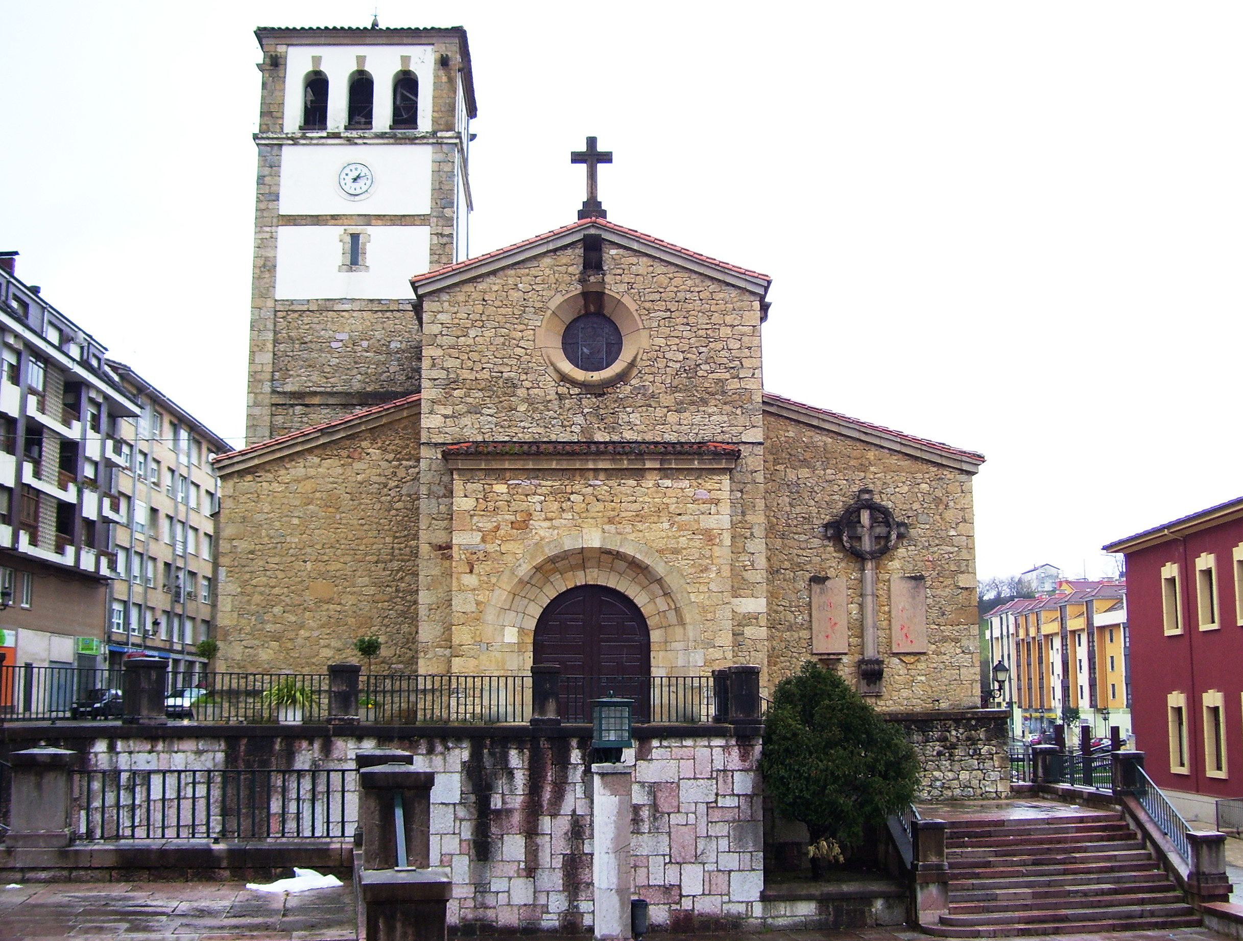 La iglesia parroquial de San Bartolomé en Nava, está en el centro de la villa junto al ayuntamiento y la casa rectoral. Se levanta en sustitución de la anterior parroquia que fue templo románico de San Bartolomé, obra del arquitecto Luis Menéndez Pidal. Es una iglesia de tres naves y crucero ligeramente sobresaliente que cubre la nave central de mayor altura con bóveda de cañón y los laterales con bóveda de arista. Está construida en sillarejo para los muros y sillar para la portada de medio punto.